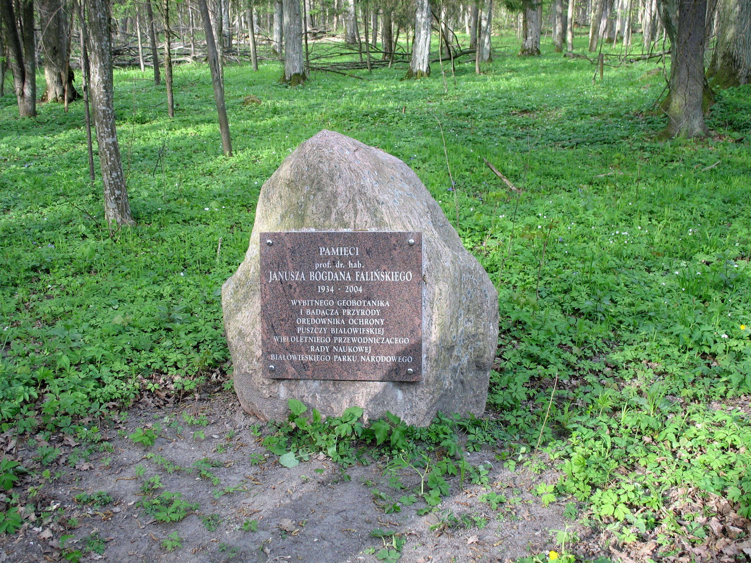 Tablica pamiątkowa poświęcona pamięci prof. dr hab. Janusz Bogdan Faliński, botanika i ekologa, umieszczona obok bramy rezerwatu ścisłego Białowieskiego Parku Narodowego